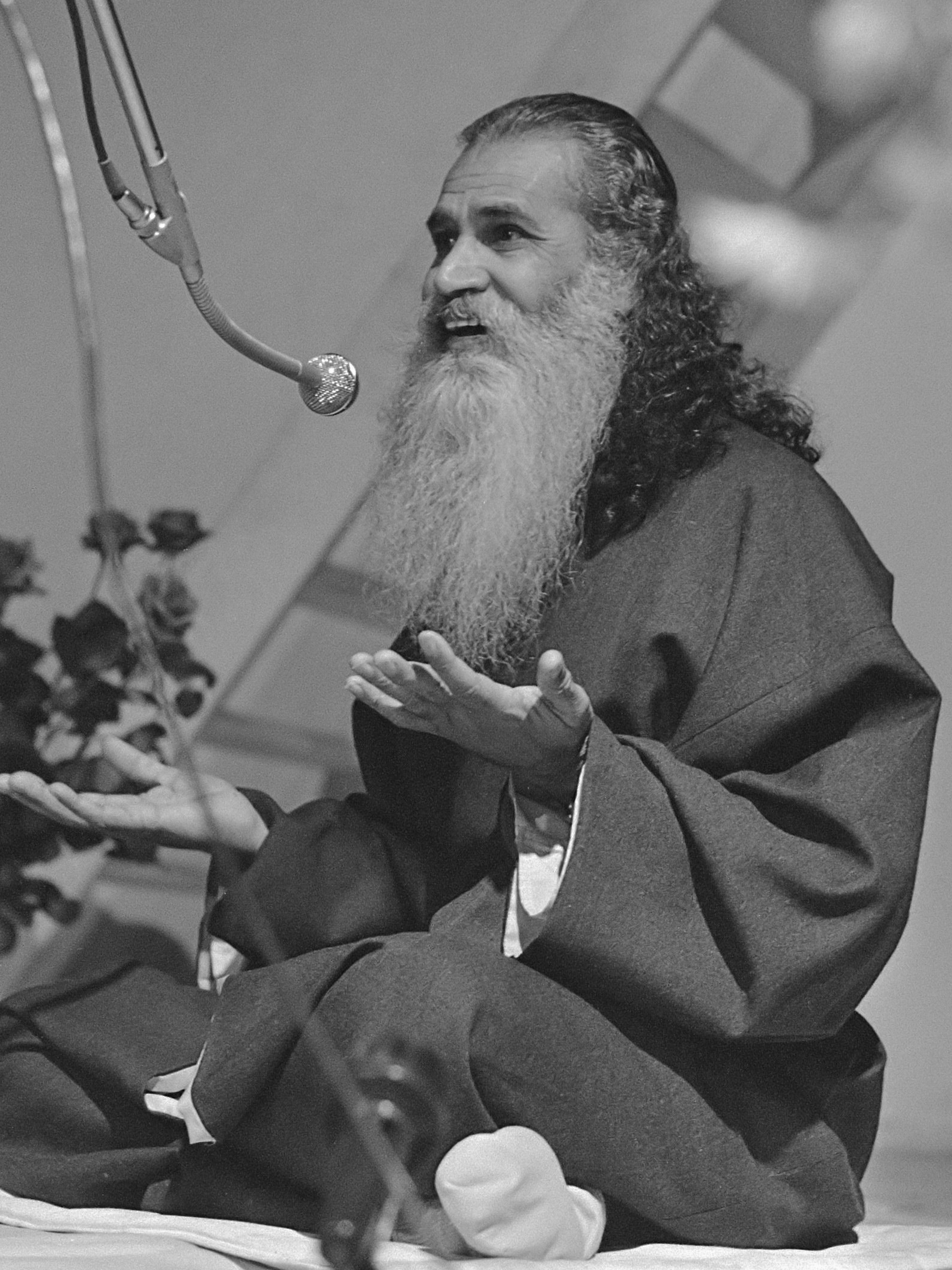 Yoga-propagandist Swami Satchidananda spreekt in Kosmos Amsterdam; Satchidananda 23 oktober 1970